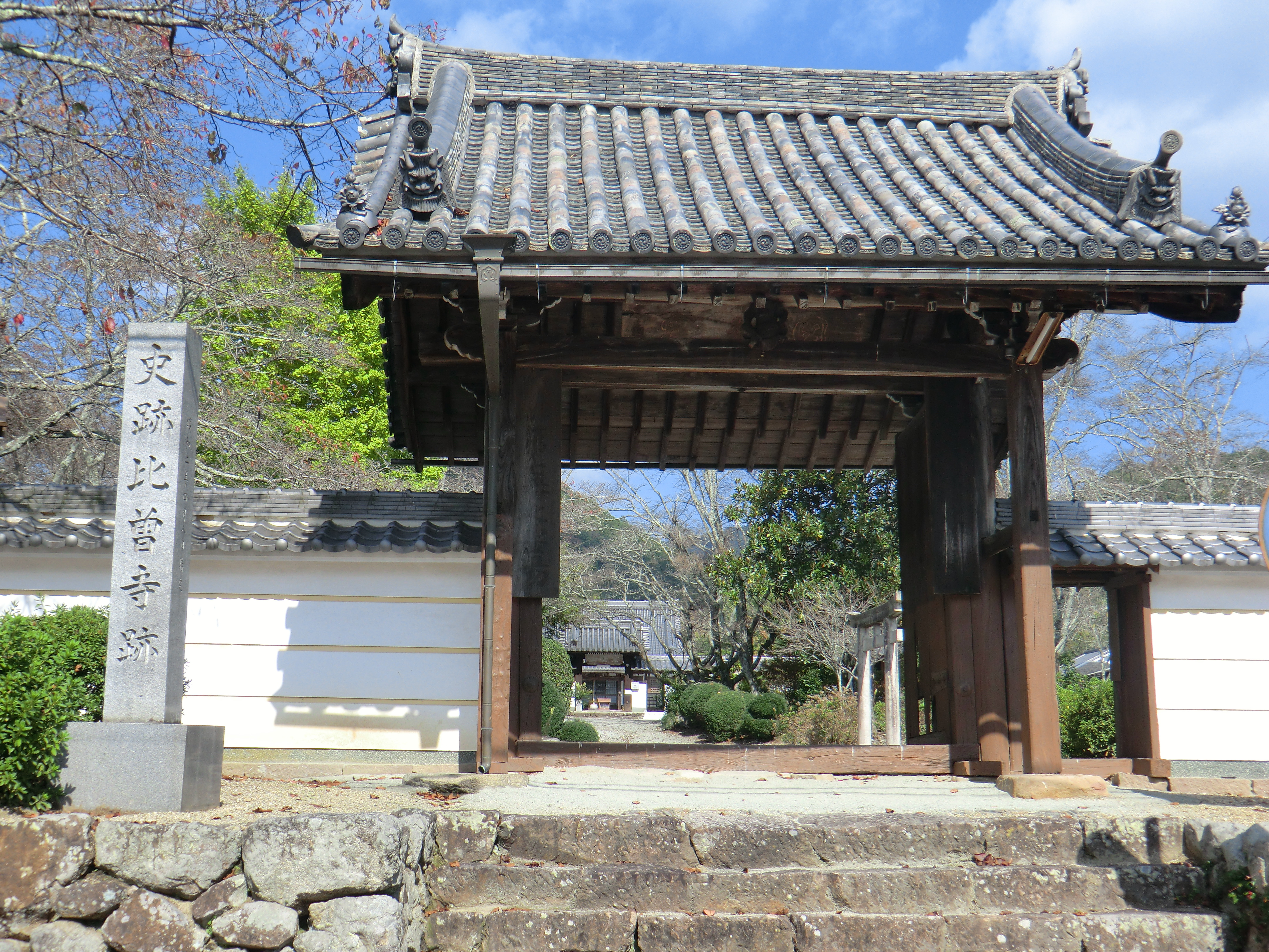 霊鷲山世尊寺（史跡比曽寺跡）・山門 (2014年10月撮影)